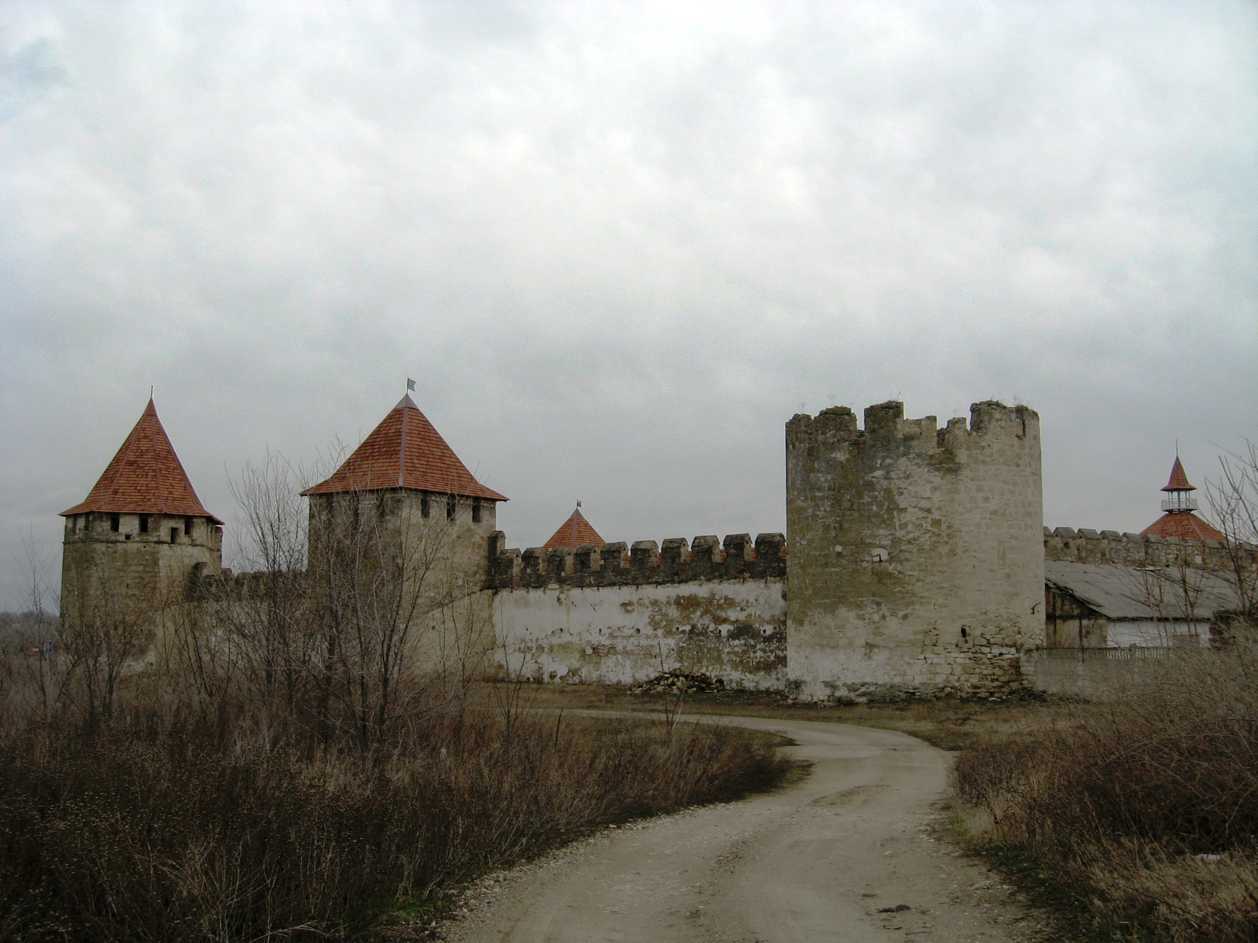 Benderska trdnjava